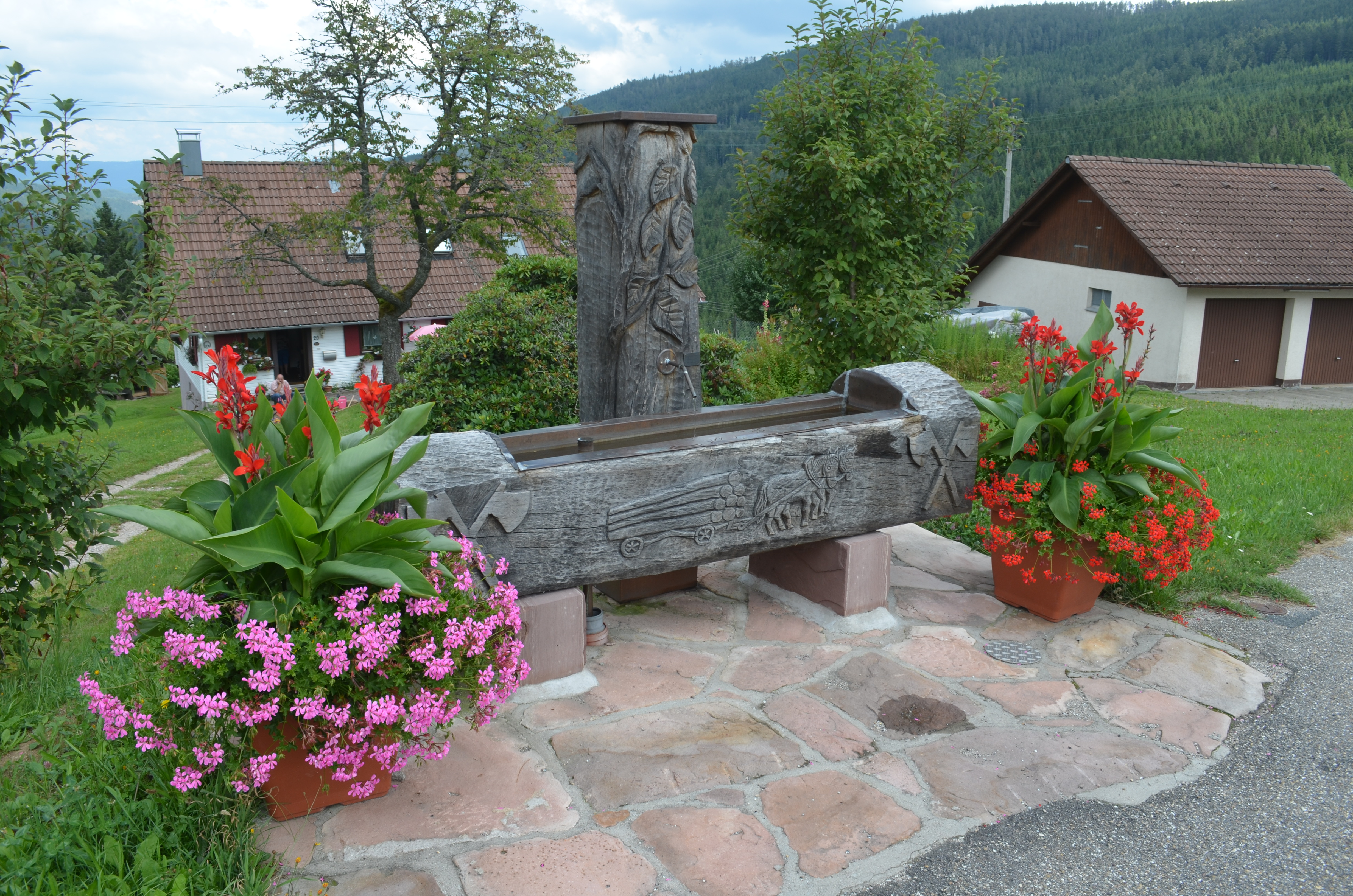 Dorfbrunnen neben der katholischen Kirche in Hundsbach (Forbach). Das Relief auf dem Brunnentrog zeigt ein Pferdegespann beim Langholztransport und das Dorfwappen (2 gekreuzte Äxte)